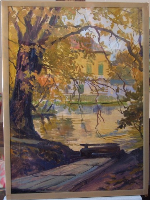 Herbststimmungtitle QS:P1476,de:"Herbststimmung" label QS:Lde,"Herbststimmung"